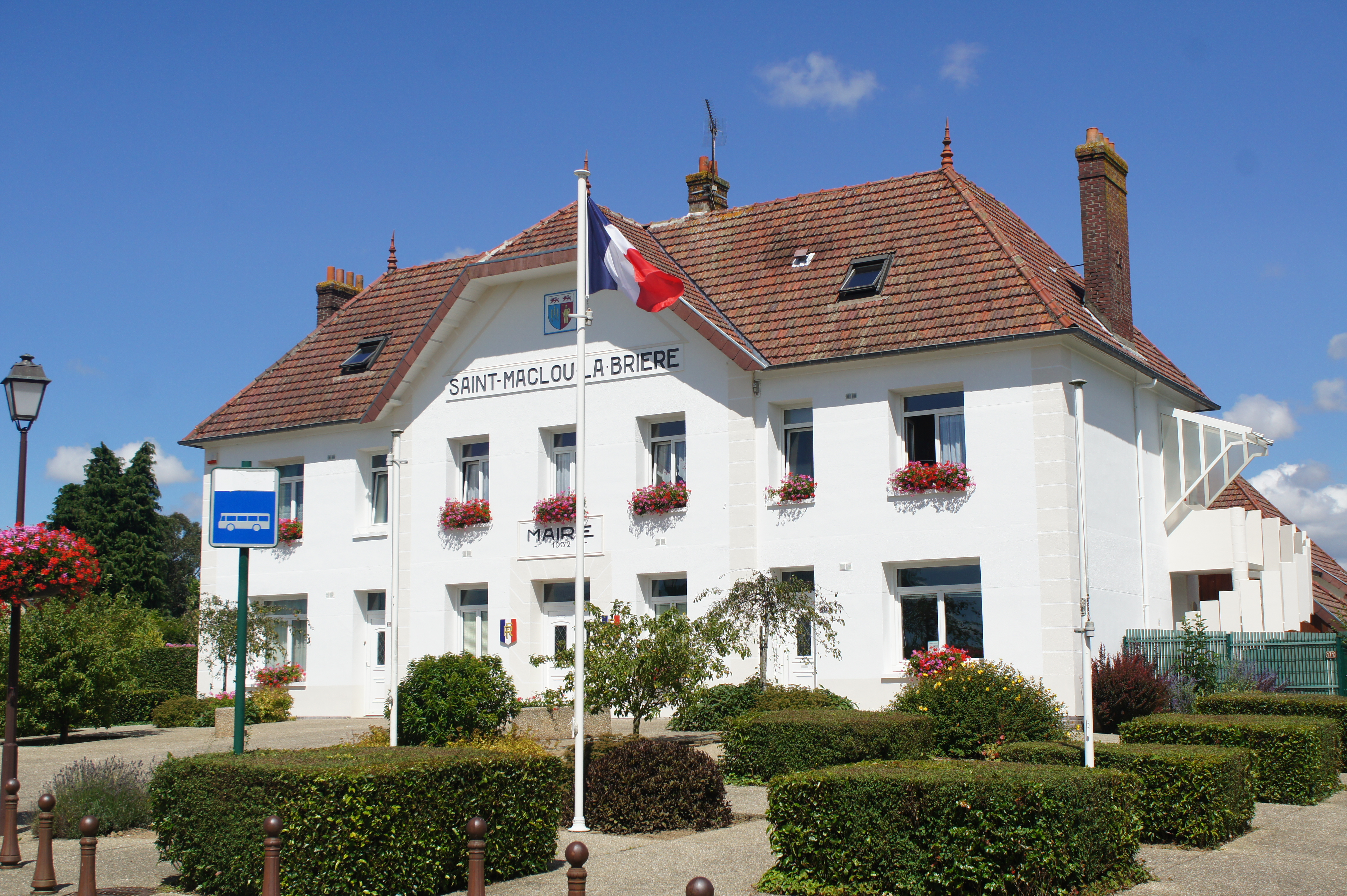 Mairie de Saint-Maclou-la-Brière